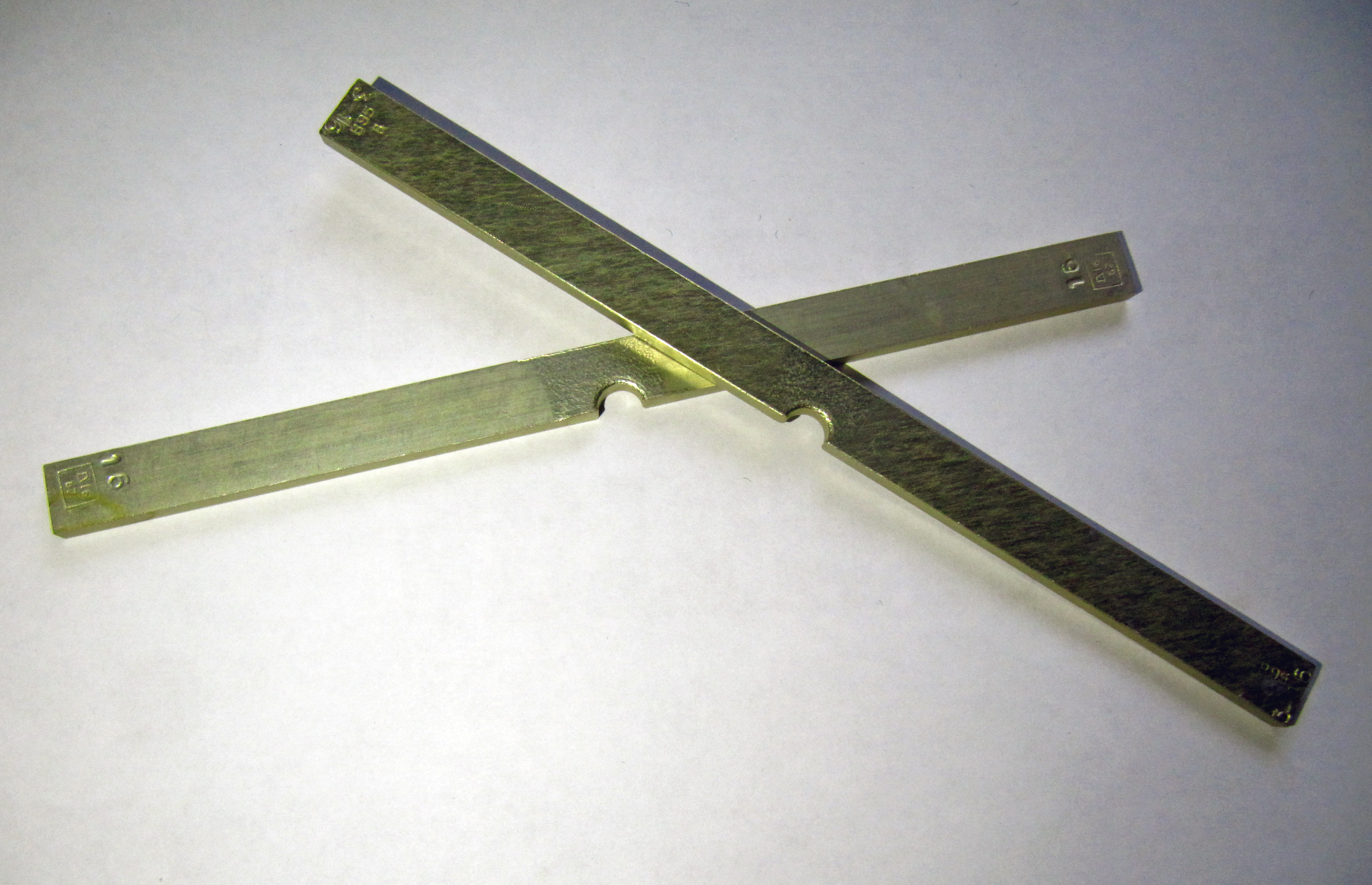 Тестові зразки для лабораторій вивчення механічних властивостей матеріалів, для демонстрації або перевірки механічних властивостей різних марок авіаційного алюмінію. На зображенні зразки з Д-16 та В95. Покриття - анодування.